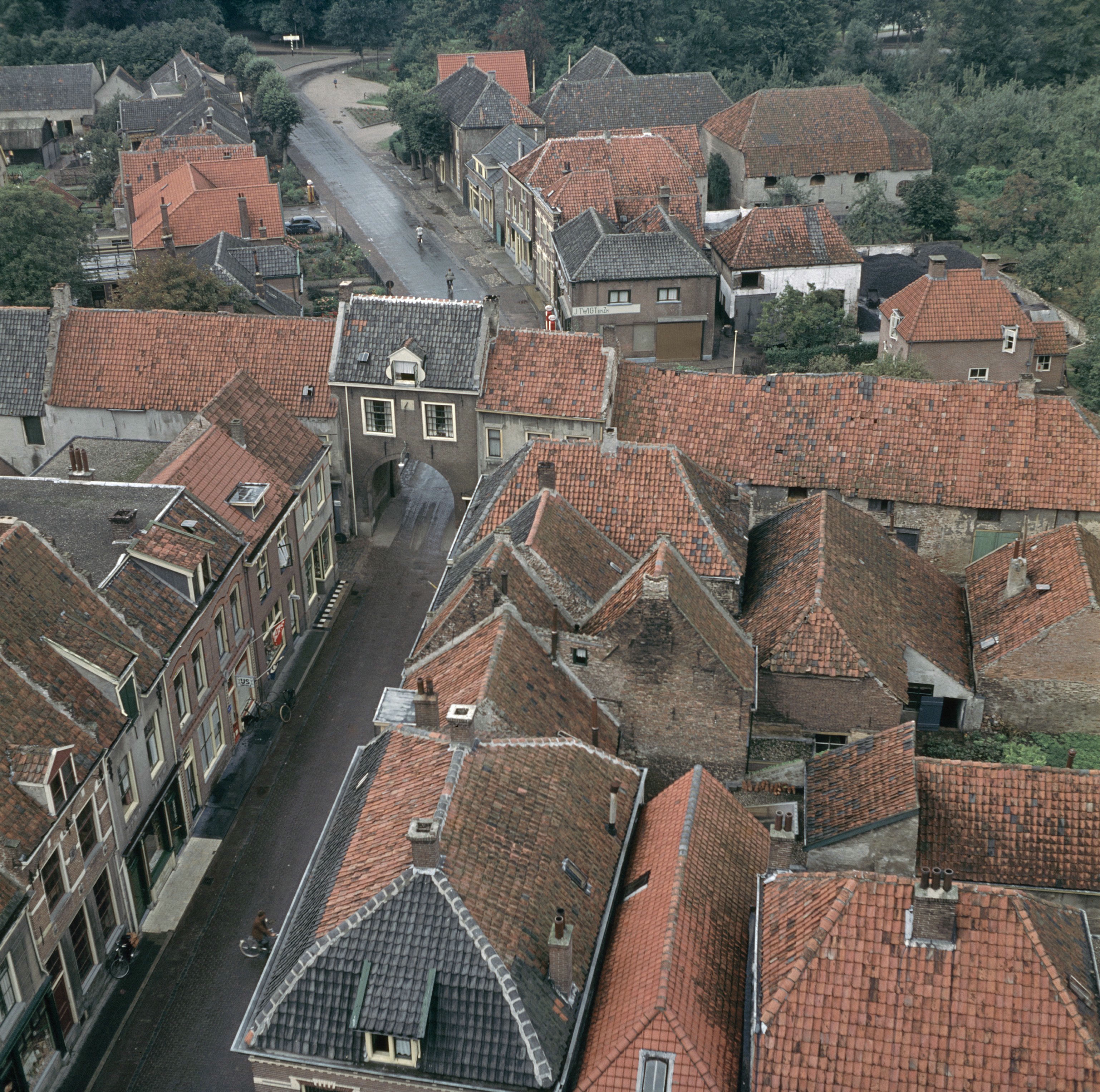 Overzicht vanaf de kerktoren naar het westen met stadspoort (opmerking: Zie ook 74.452)